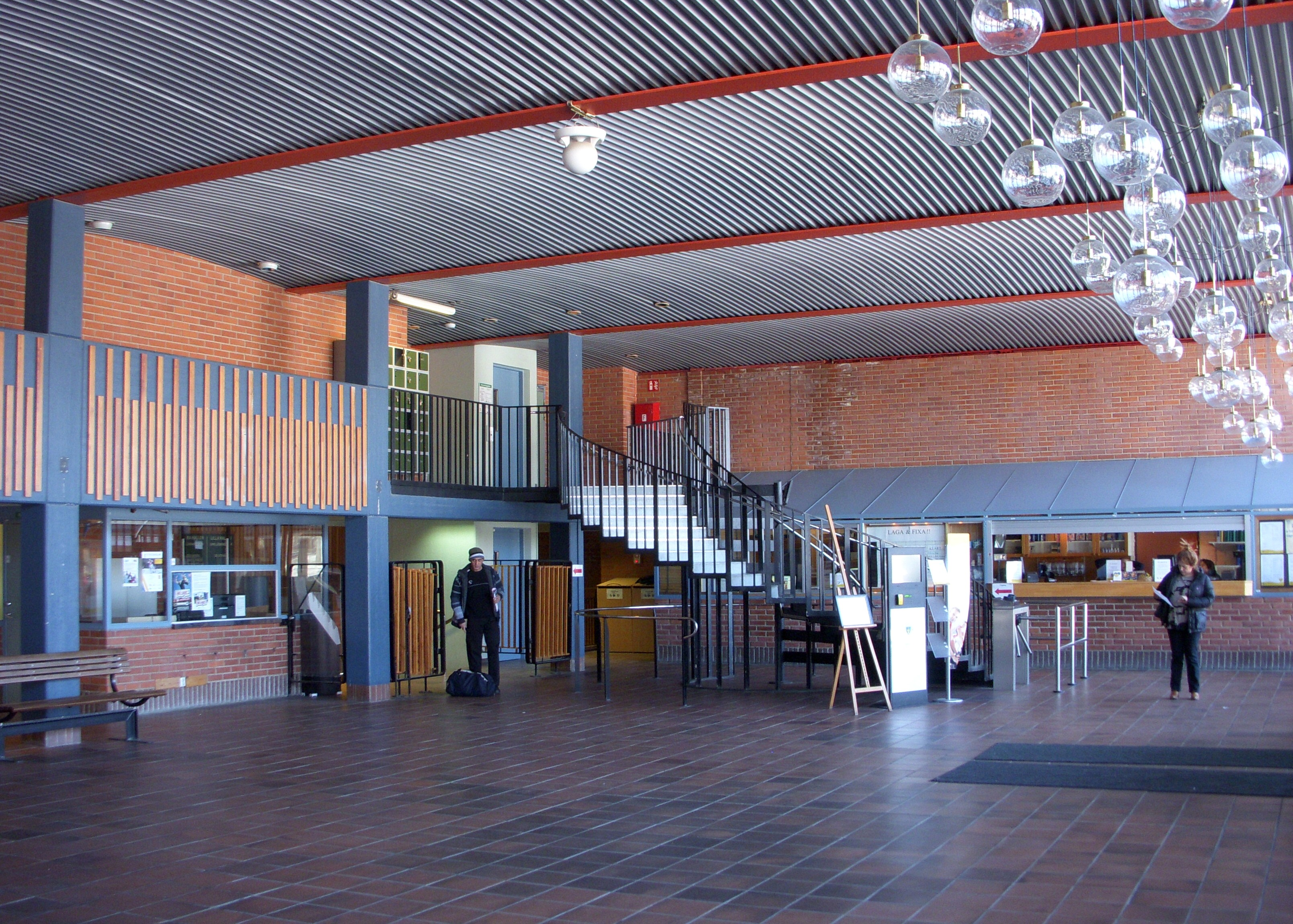 Farstahallen i Farsta strand, entréhallen